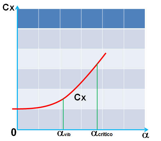 gráfico de Cx contra ángulo de ataque.